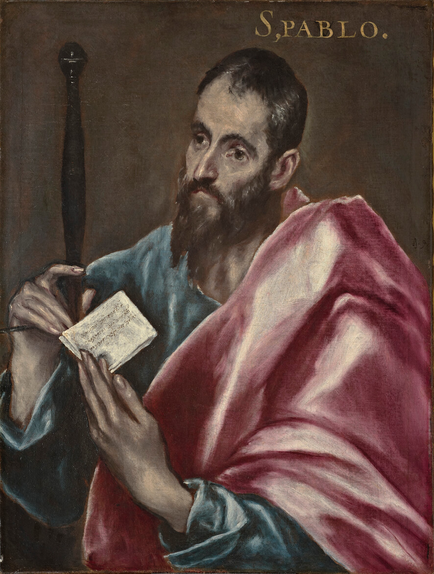 La obra representa al apóstol San Pablo, junto al que hay una gran espada como símbolo de su muerte por decapitación.